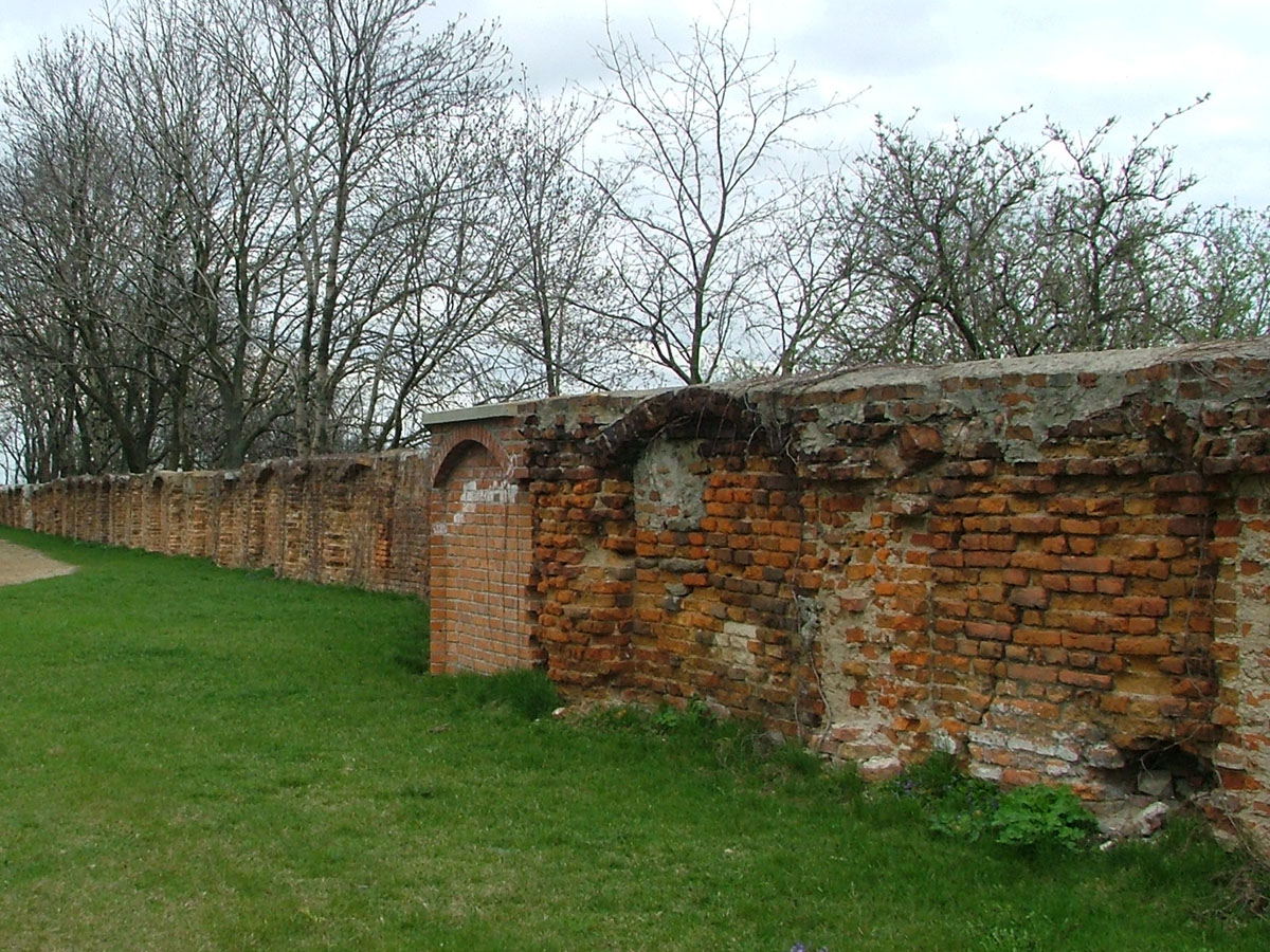 Chełm - Sanktuarium Maryjne na Górze Chełmskiej, Ogród Matki Bożej, Zielony Różaniec